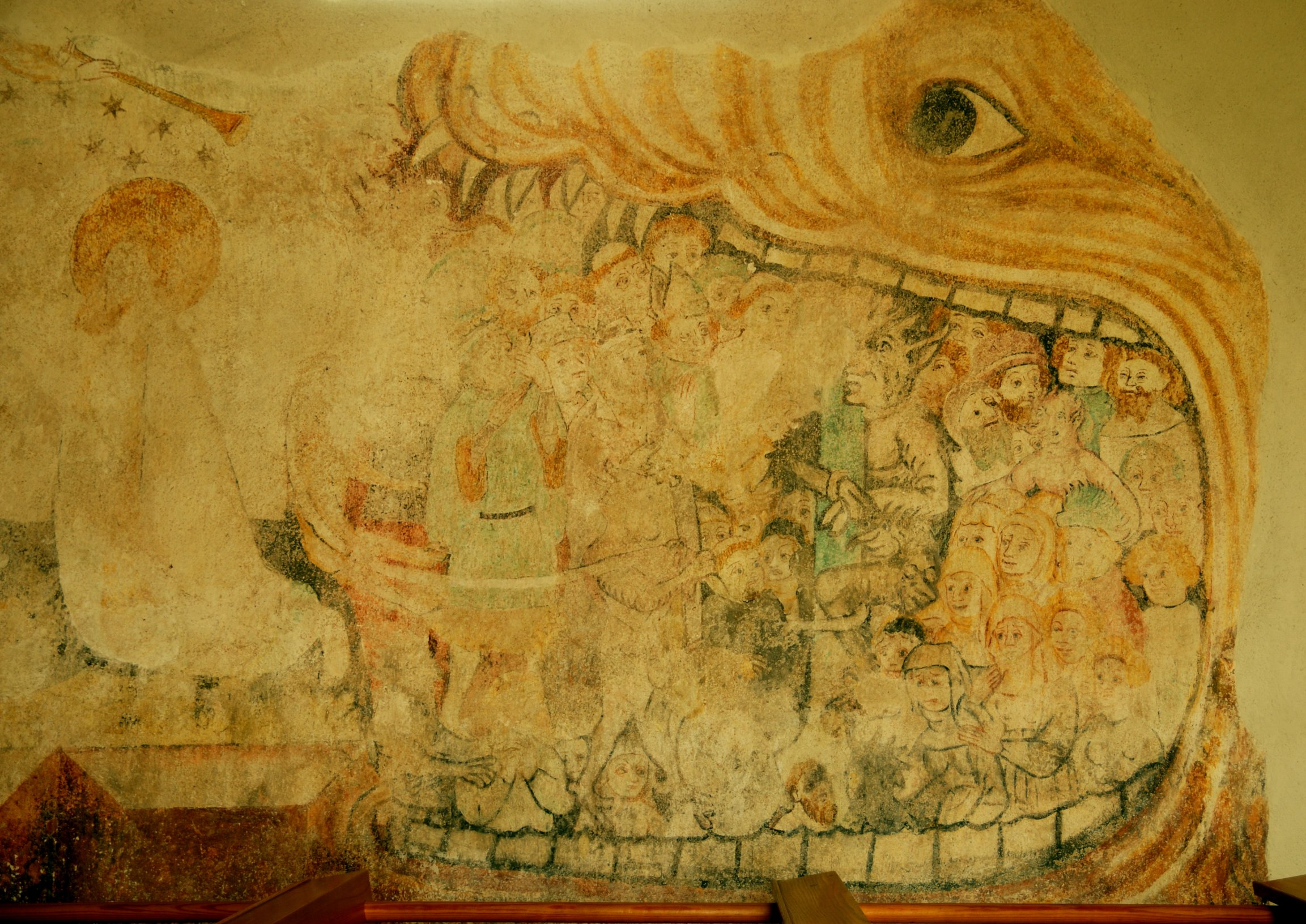 Peterskirche Blansingen: Höllendrache in der Darstellung des Jüngsten Gerichts